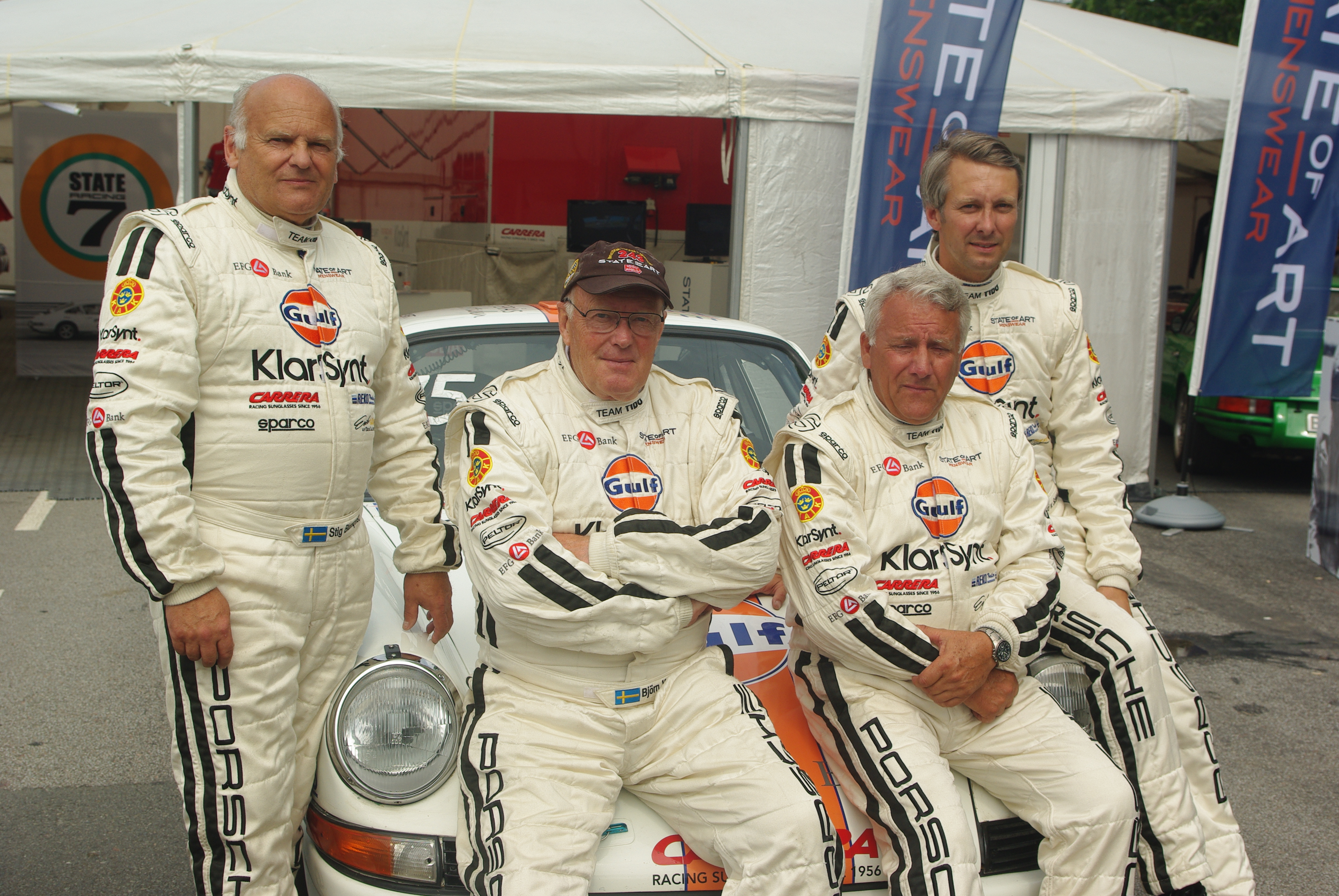 Team Tidö i Midnattssolsrallyt 2011. Från vänster: Stig Blomqvist, Björn Waldegård, Åke Andersson och David von Schinkel.